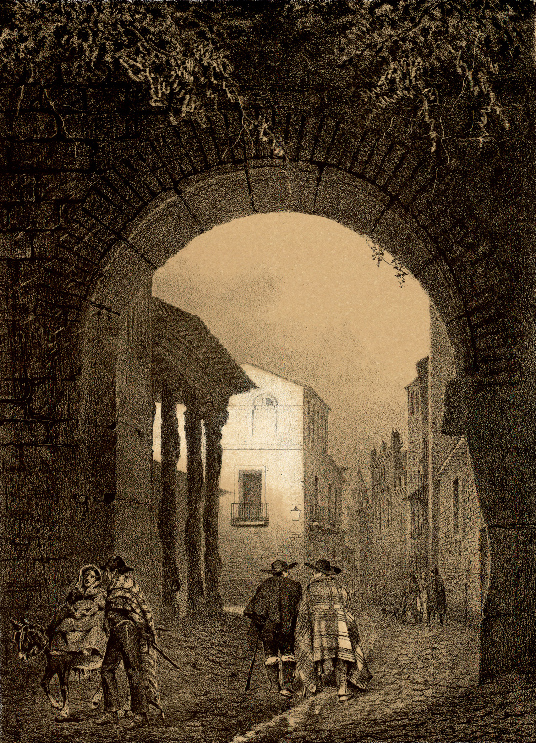 Puerta de Zamora (Talavera de la Reina).